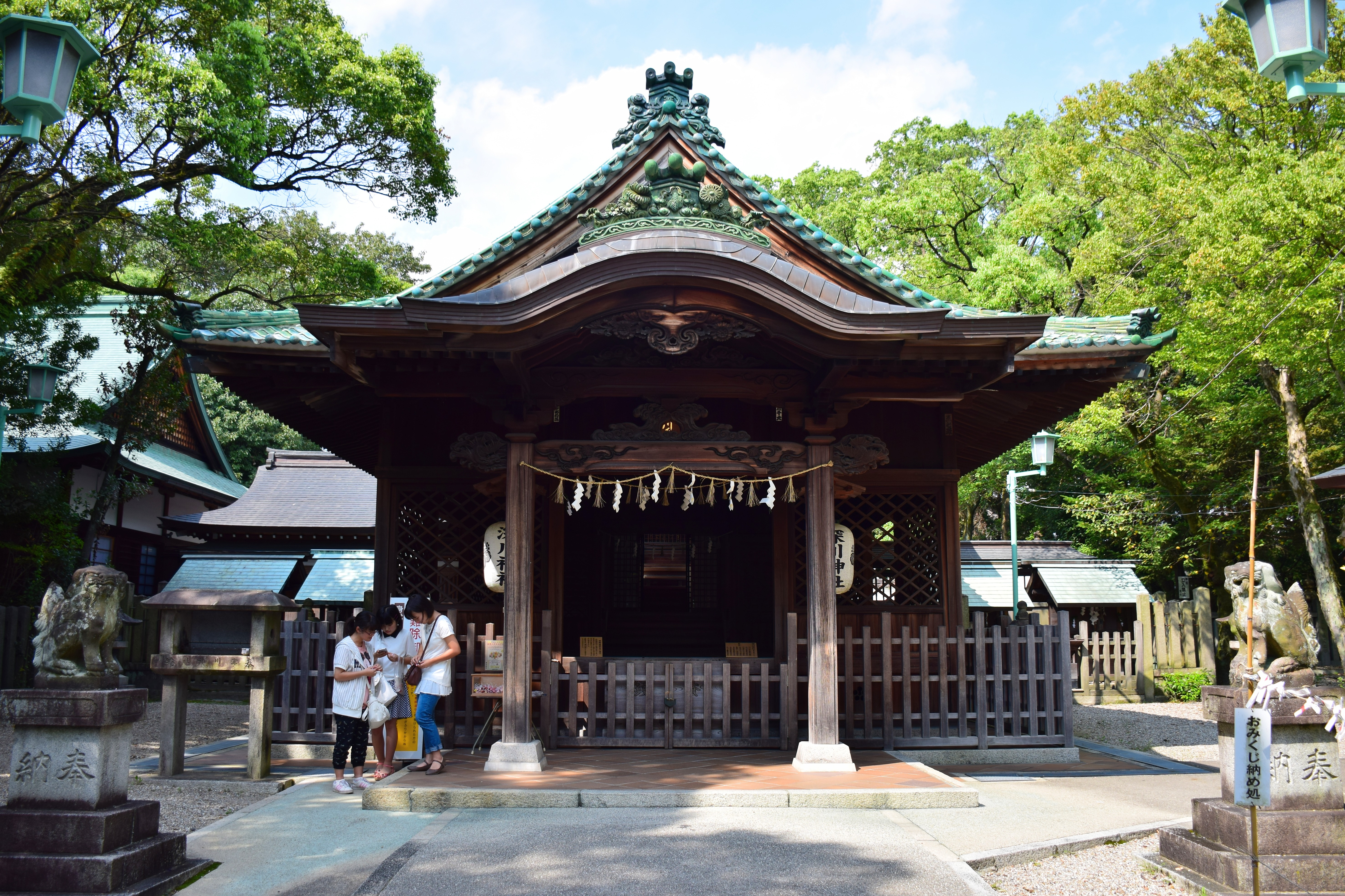 深川神社拝殿